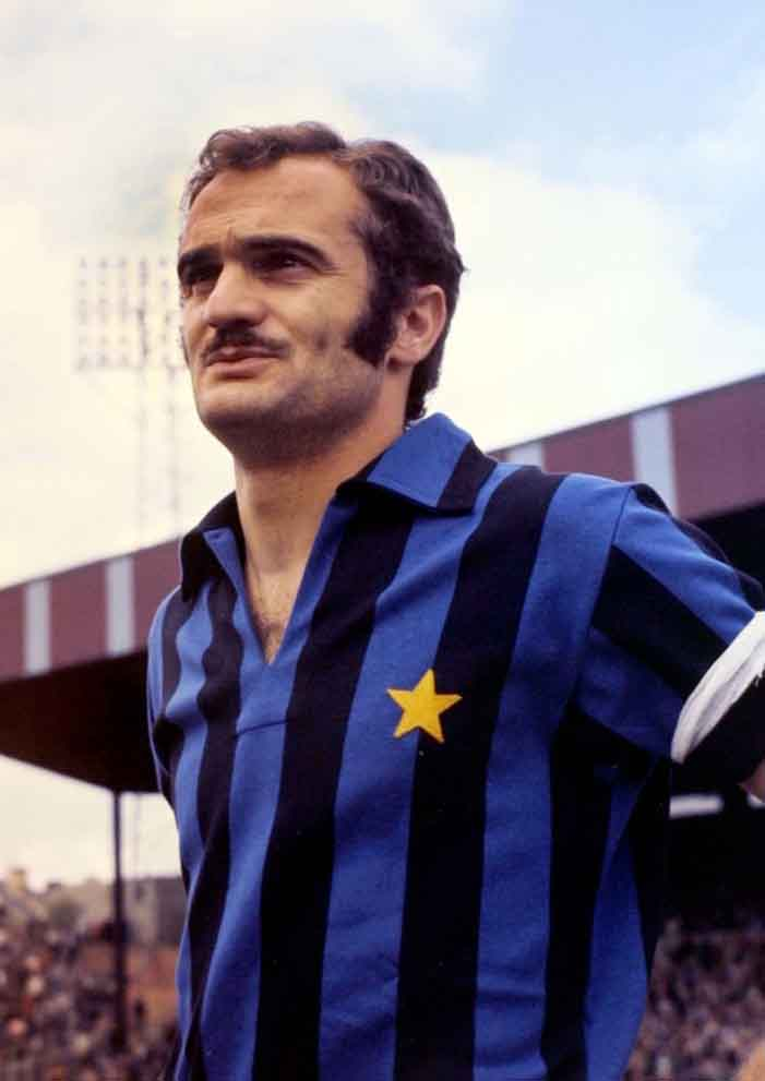 Mazzola con l'Inter. Licensing Mazzola, Sandro Categoria:Immagini di Sandro Mazzola